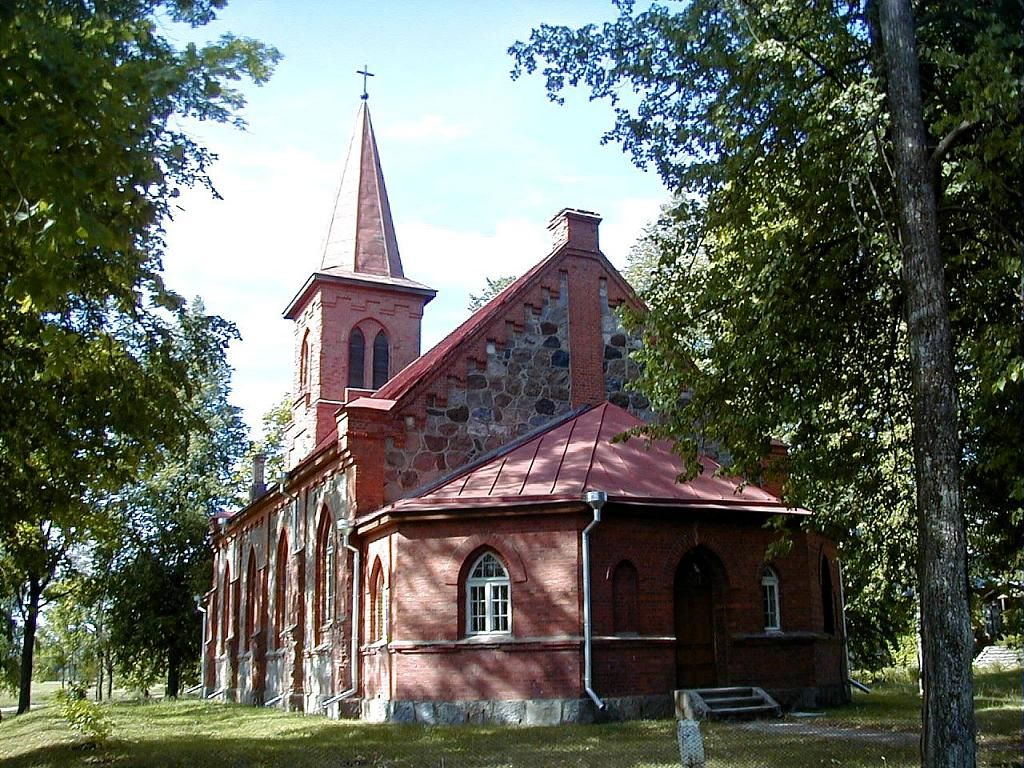 Tilžas luterāņu baznīca 2002-08-10